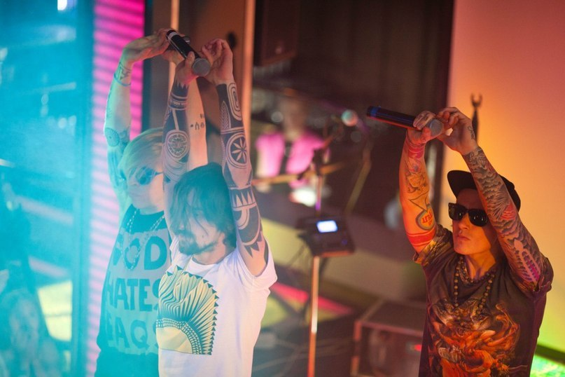 Quest Pistols Пермь